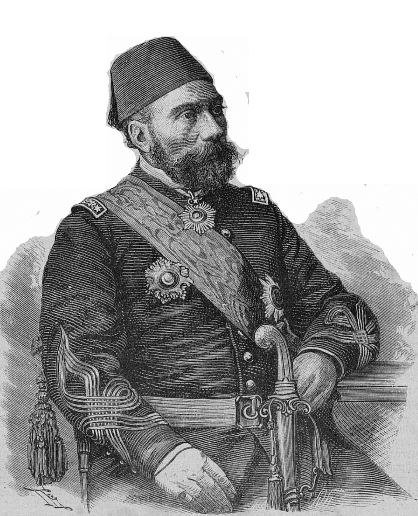 Осман-паша в плену, 1877 год. Данный рисунок был также использован для иллюстрирования статьи «Осман-Нури-Гази-паша» опубликованной в семнадцатом томе «Военной энциклопедии», который был издан книгоиздательским товариществом Ивана Дмитриевича Сытина в 1914 году в столице Российской империи городе Санкт-Петербурге. Подробное описание к этой фотографии можно прочесть в указанной выше статье на сайте Русской Викитеки.